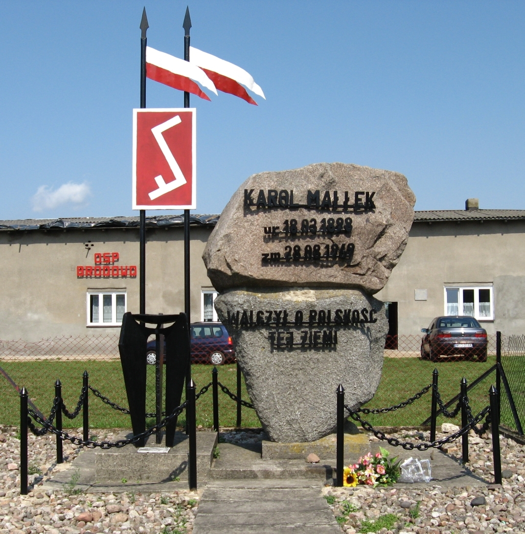 Brodowo - pomnik Karola Małłka - działacza mazurskiego. Pomnik został ufundowany we wrześniu 1988 roku, przez Stowarzyszenie WISŁA ODRA (Zarząd Główny, Warszawa).